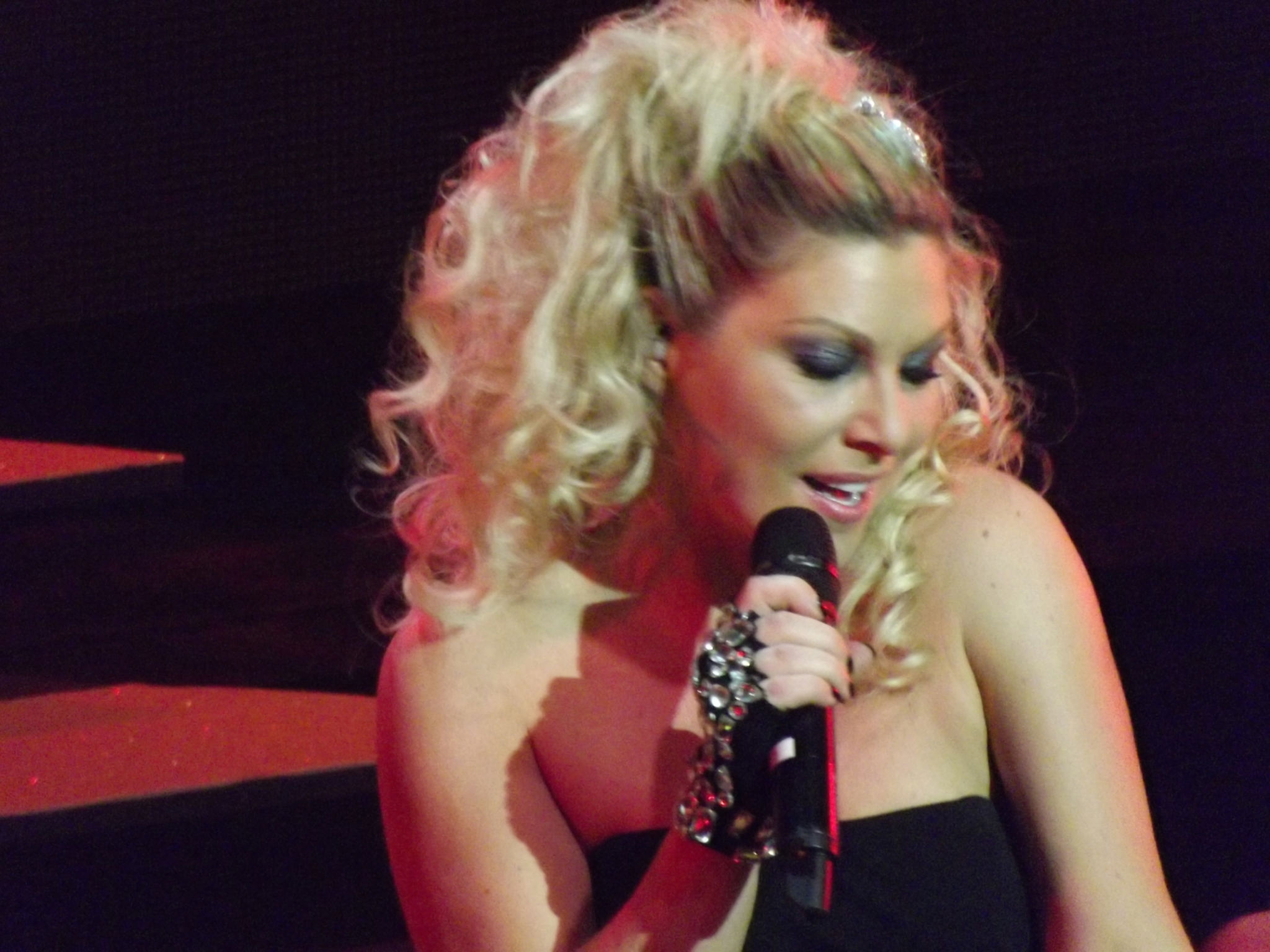 Zangeres Jessy De Smet tijdens de uitreiking van de anne awards 2012 op 15 januari 2013